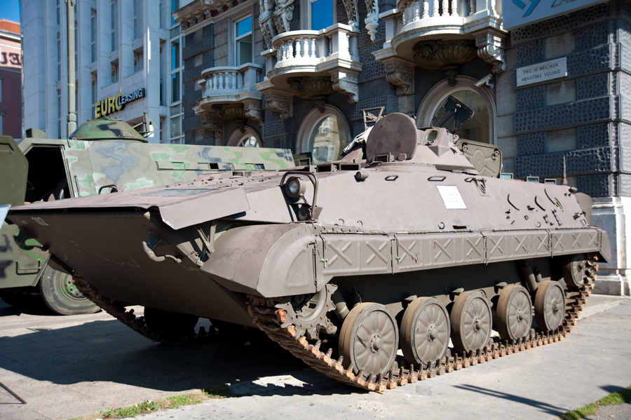 Izložba ratne tehnike iz Domovinskoga rata, iz fundusa Vojnoga muzeja MORH-a. Izložba se održava povodom dvadeset godina hrvatske neovisnosti i dvadesete obljetnice ustrojavanja Zbornog područja Rijeka.